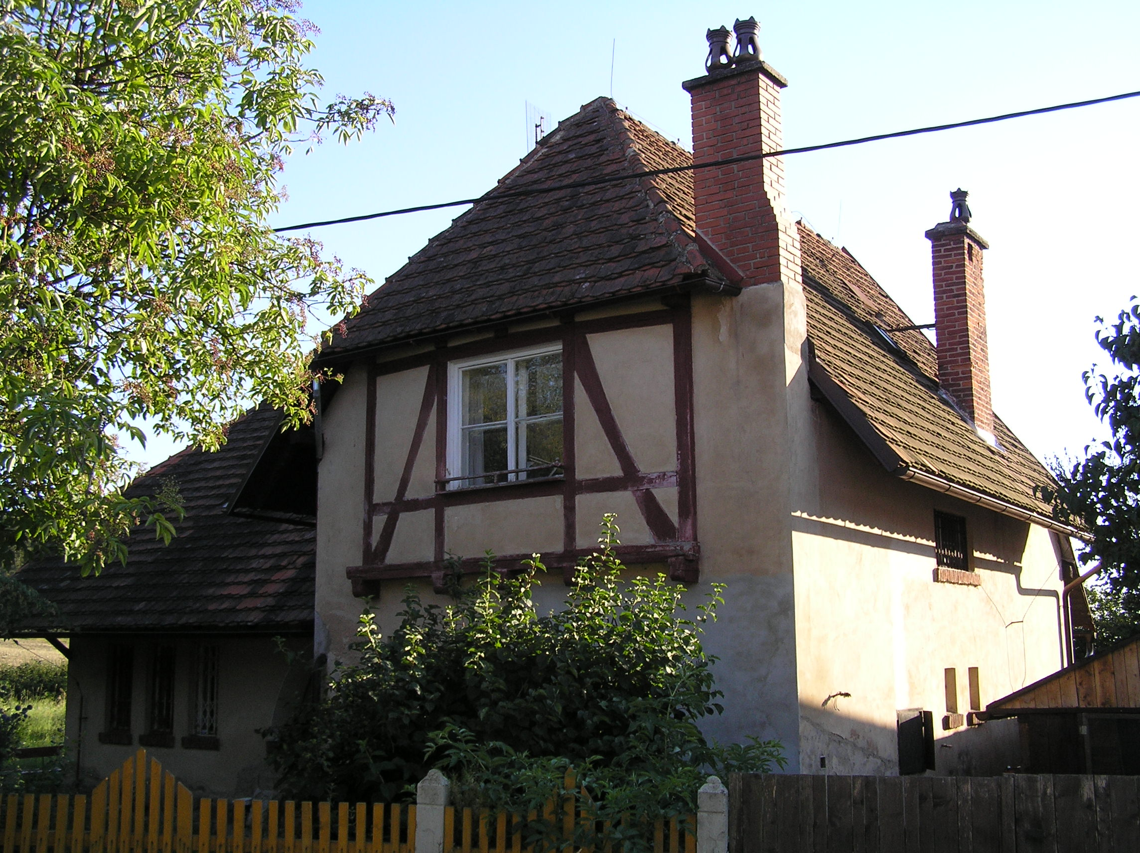 Vila čp. 11, Hostišov 11, Hostišov.